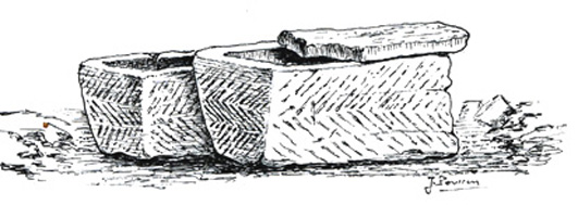 Dessin exécuté par J. Poussin auteur du site